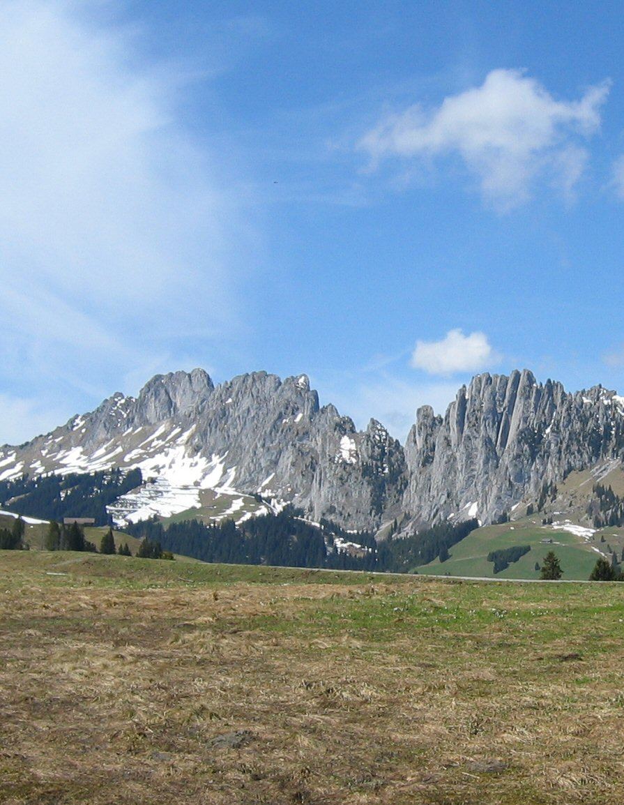 Jaunpass, Blick auf die Gastlosen.